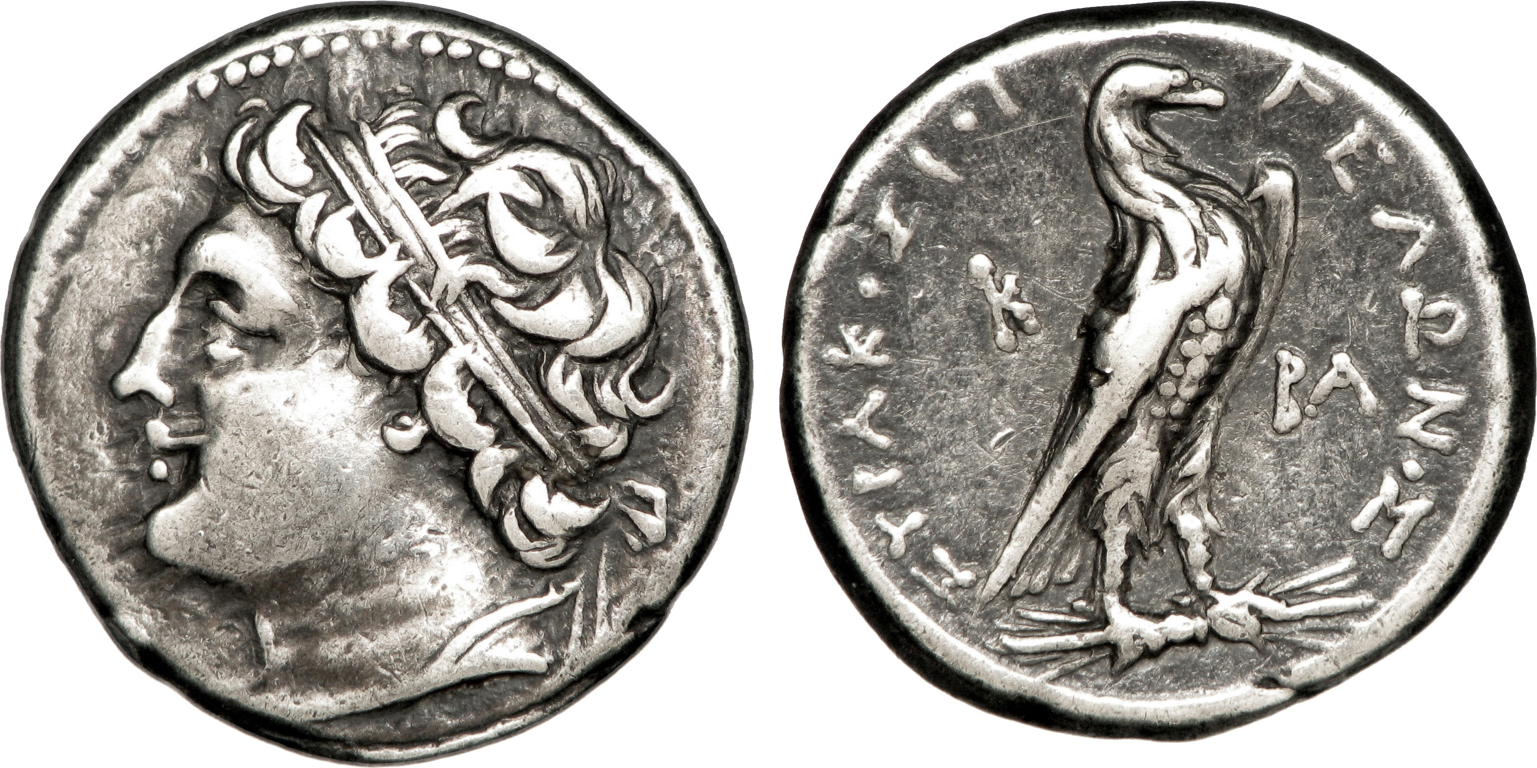 Nom de l'atelier : Sicile, Syracuse Métal : argent Diamètre : 16,5mm Axe des coins : 11h. Poids : 3,37g. Titulature avers : Anépigraphe. Description avers : Tête diadémée de Gélon à gauche. Description revers : Aigle debout à droite sur un foudre, les ailes fermées. Légende revers : GELONOS SURAKOSI / K - BA. Traduction revers : (Gélon de Syracuse).